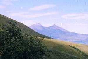 Volcano Illiniza, Ecuador